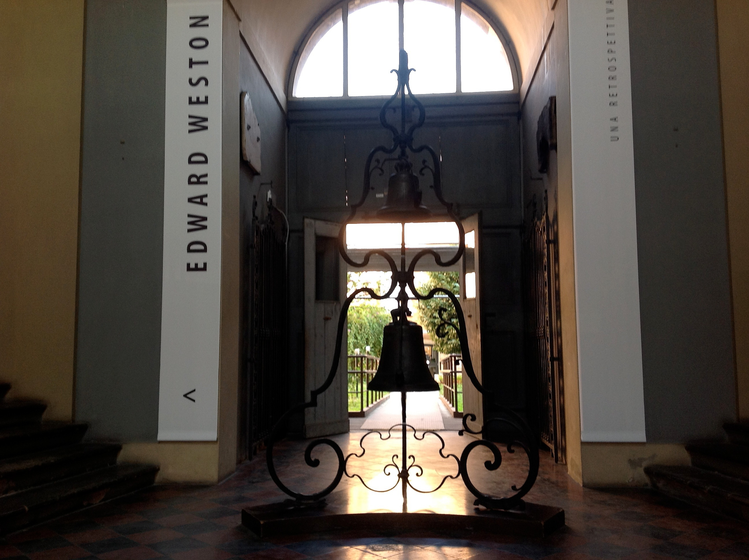 Museo Sant'Agostino This is a photo of a monument which is part of cultural heritage of Italy.